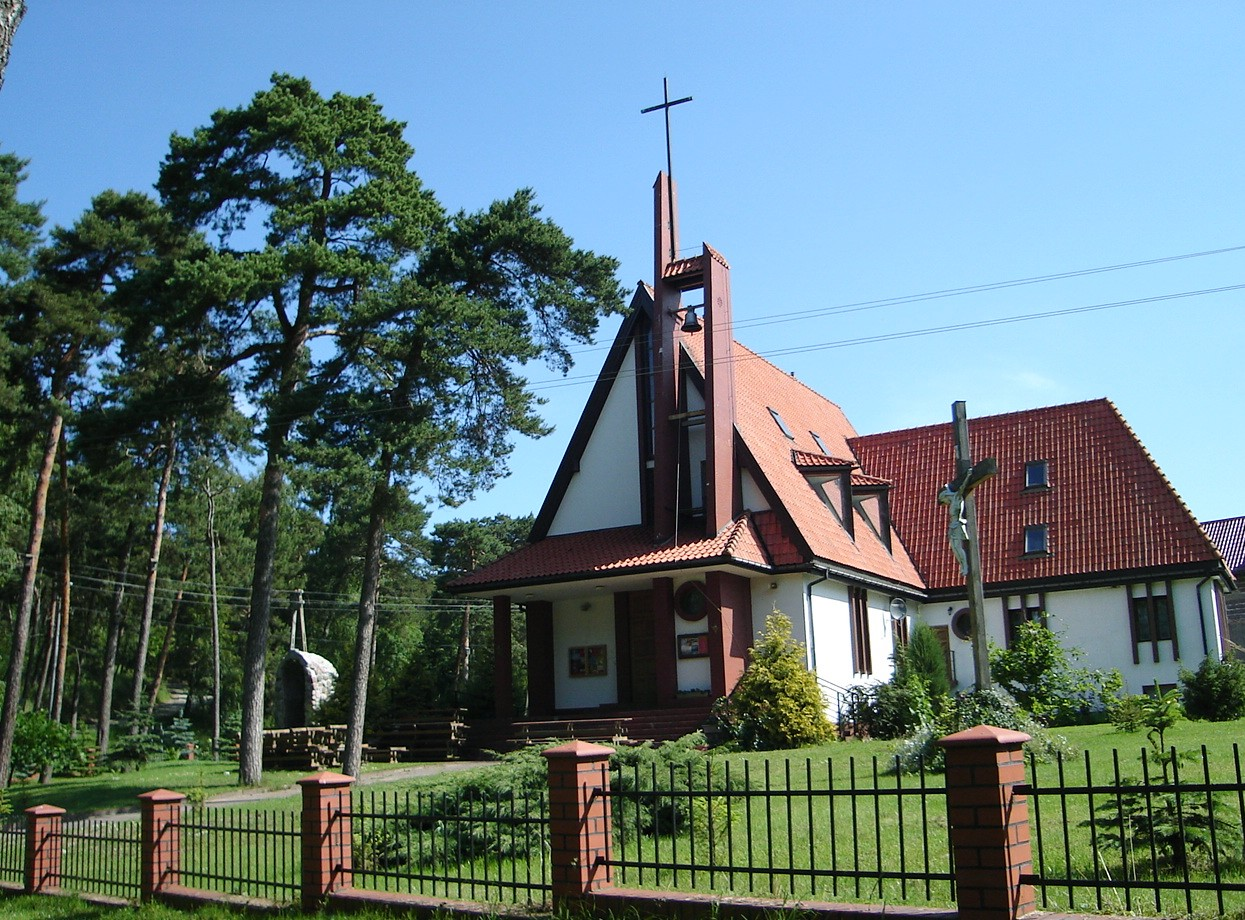 Krynica Morska Nowa Karczma, ul. Słoneczna 25 - rzymskokatolicki kościół parafialny pw. Matki Bożej Gwiazdy Morza.